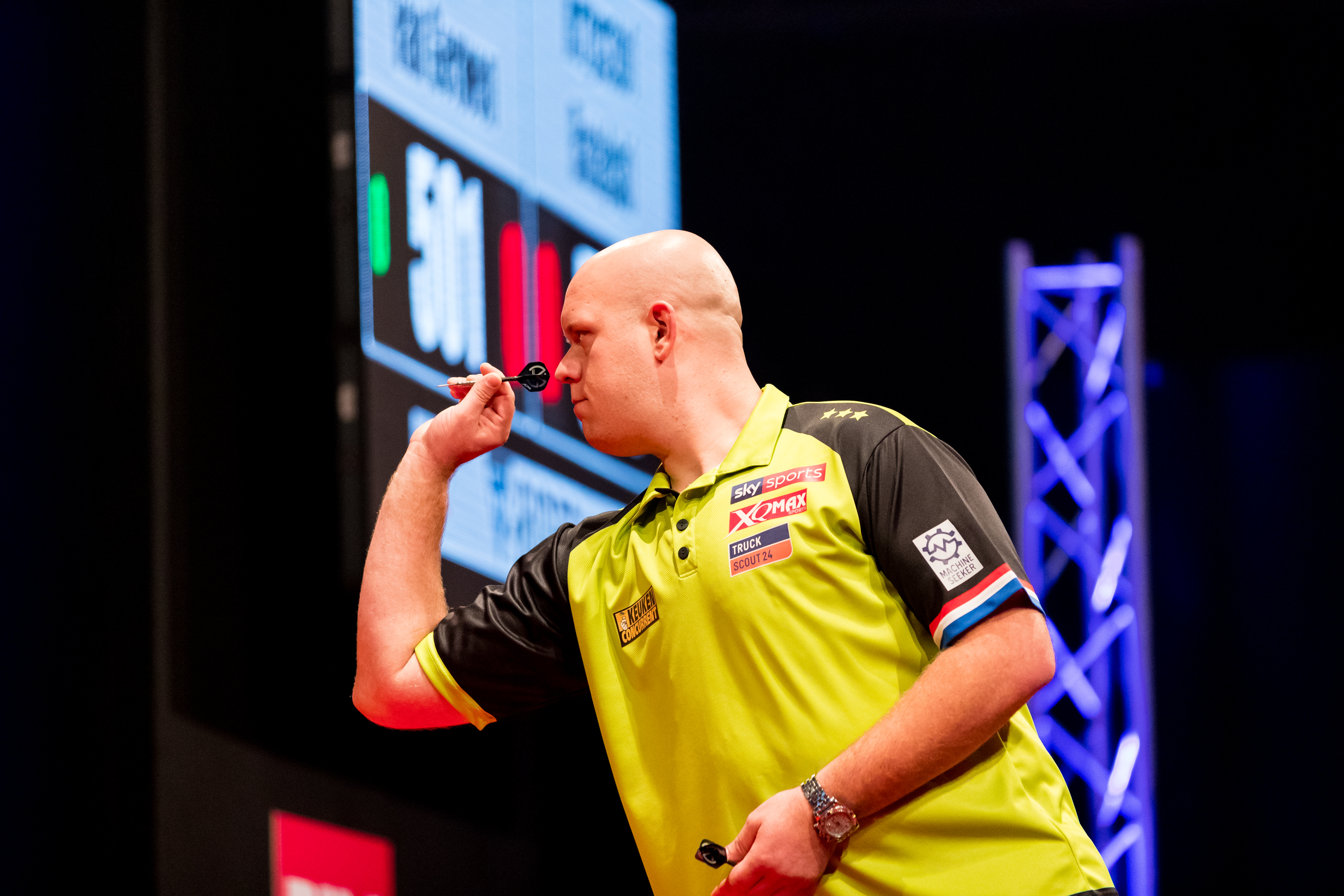 Michael van Gerwen 6:5 Krzysztof Ratajski during PDC Europe Darts Matchplay at Maimarkthalle, Mannheim, Baden-Württemberg, Germany on 2019-09-08, Photo: Sven Mandel